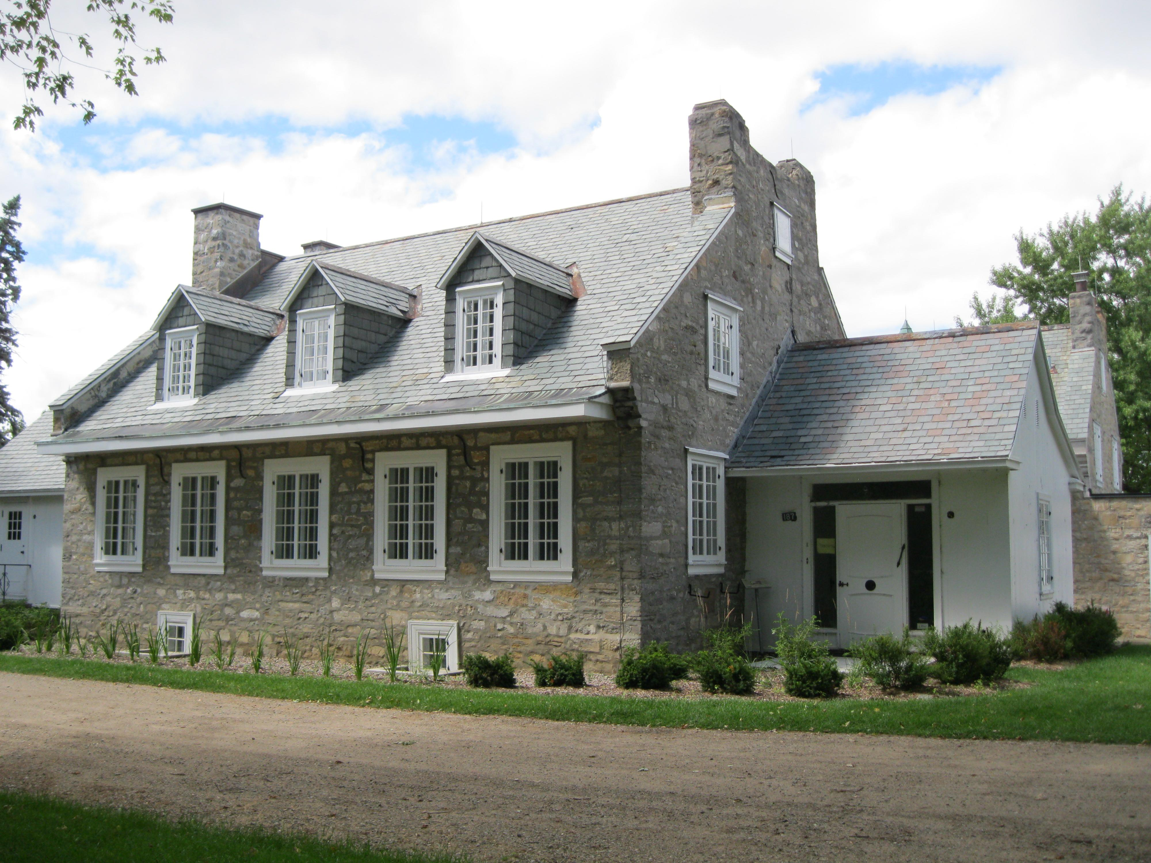 Maison Thomas-Brunet, 187, chemin du Cap-Saint-Jacques, Pierrefonds-Roxboro (Montréal)